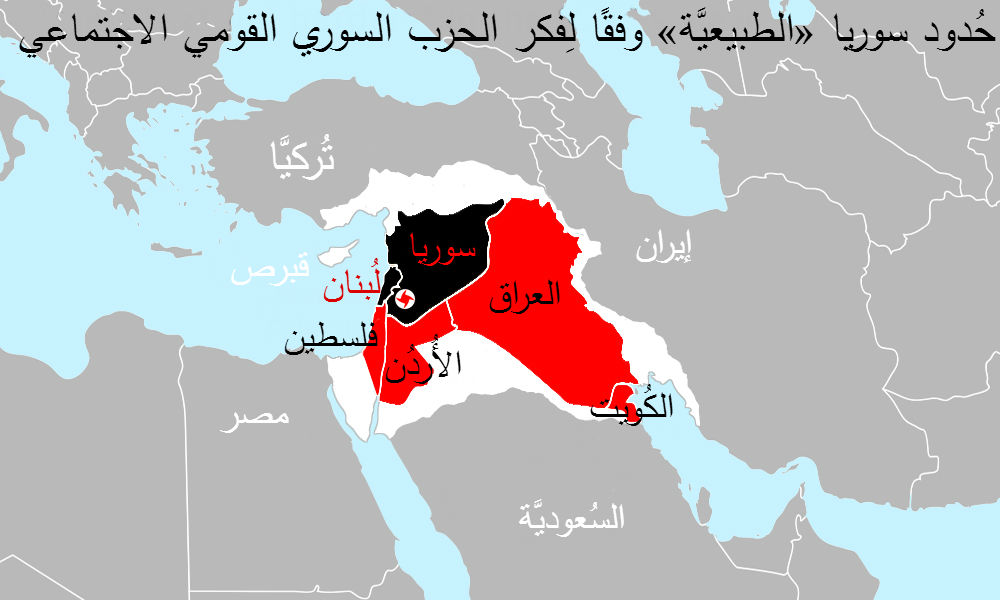 حُدود سوريا الطبيعيَّة كما تخيَّلها المُفكّر أنطون سعادة.